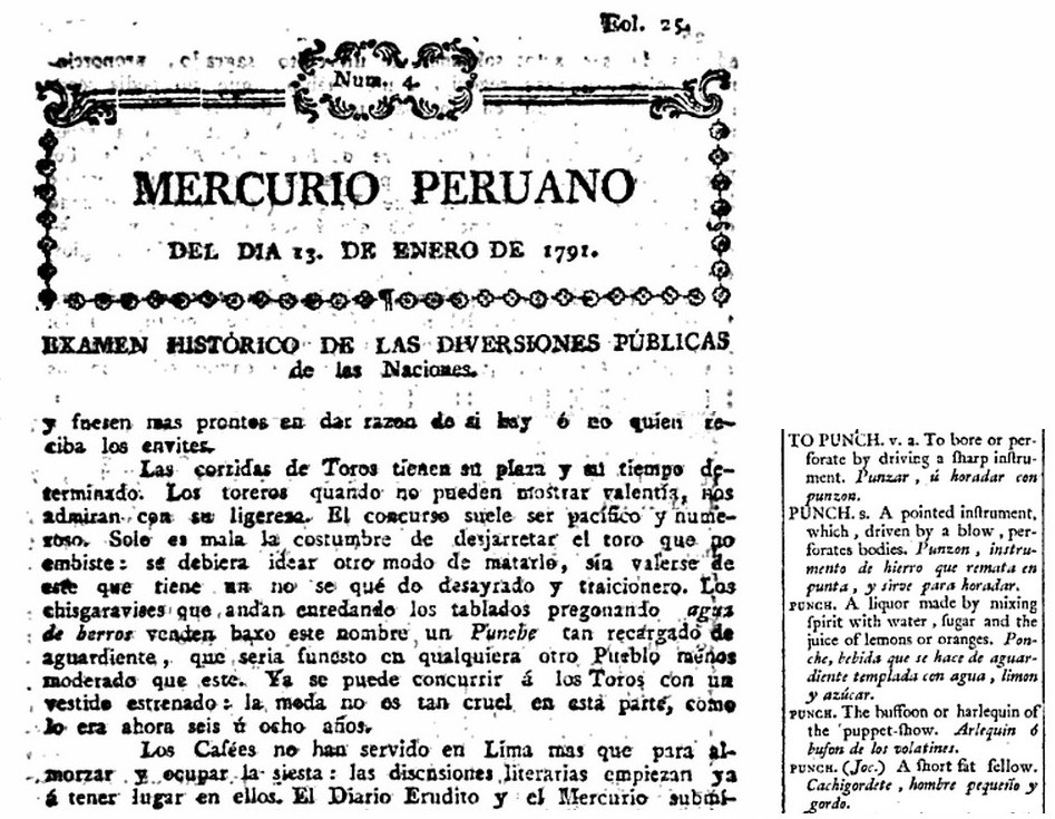 Pagina de El Mercurio Peruano del 13 de enero de 1791